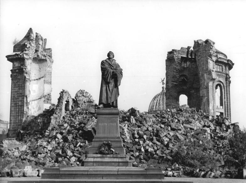 ADN-ZB-Löwe Hen-Schä Dresden nach dem britisch-amerikanischen Luftangriff am 13.-14.2.1945 Das wieder aufgestellte Lutherdenkmal und die Ruine der Frauenkirche, ein bleibendes Denkmal für die sinnlose Zerstörung der Stadt. Aufn.Nov.1958